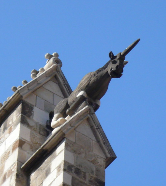 Gàrgola a l'absis de la catedral de Barcelona